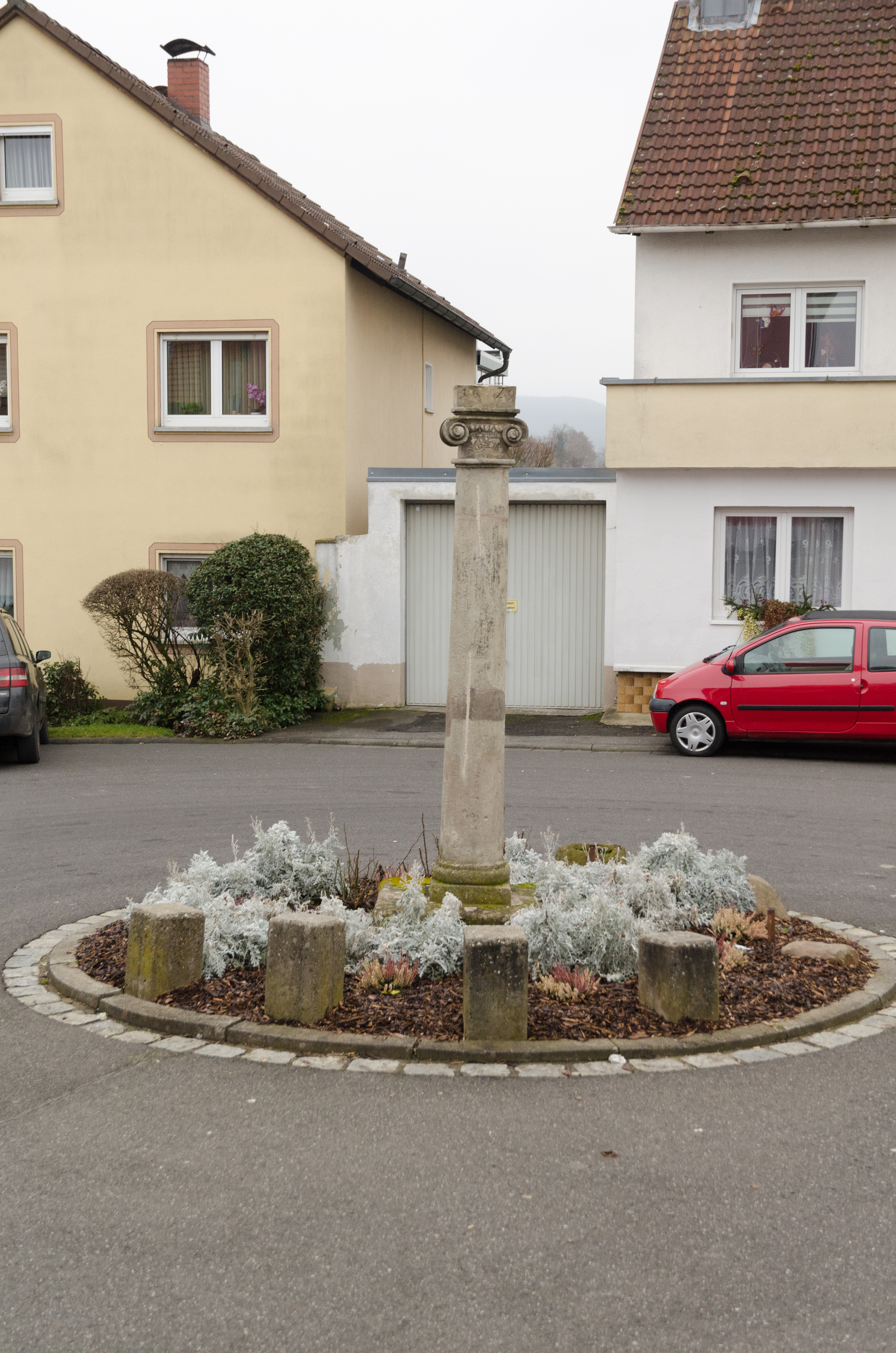 Sulzfeld im Grabfeld, Bildstock, Kirchplatz